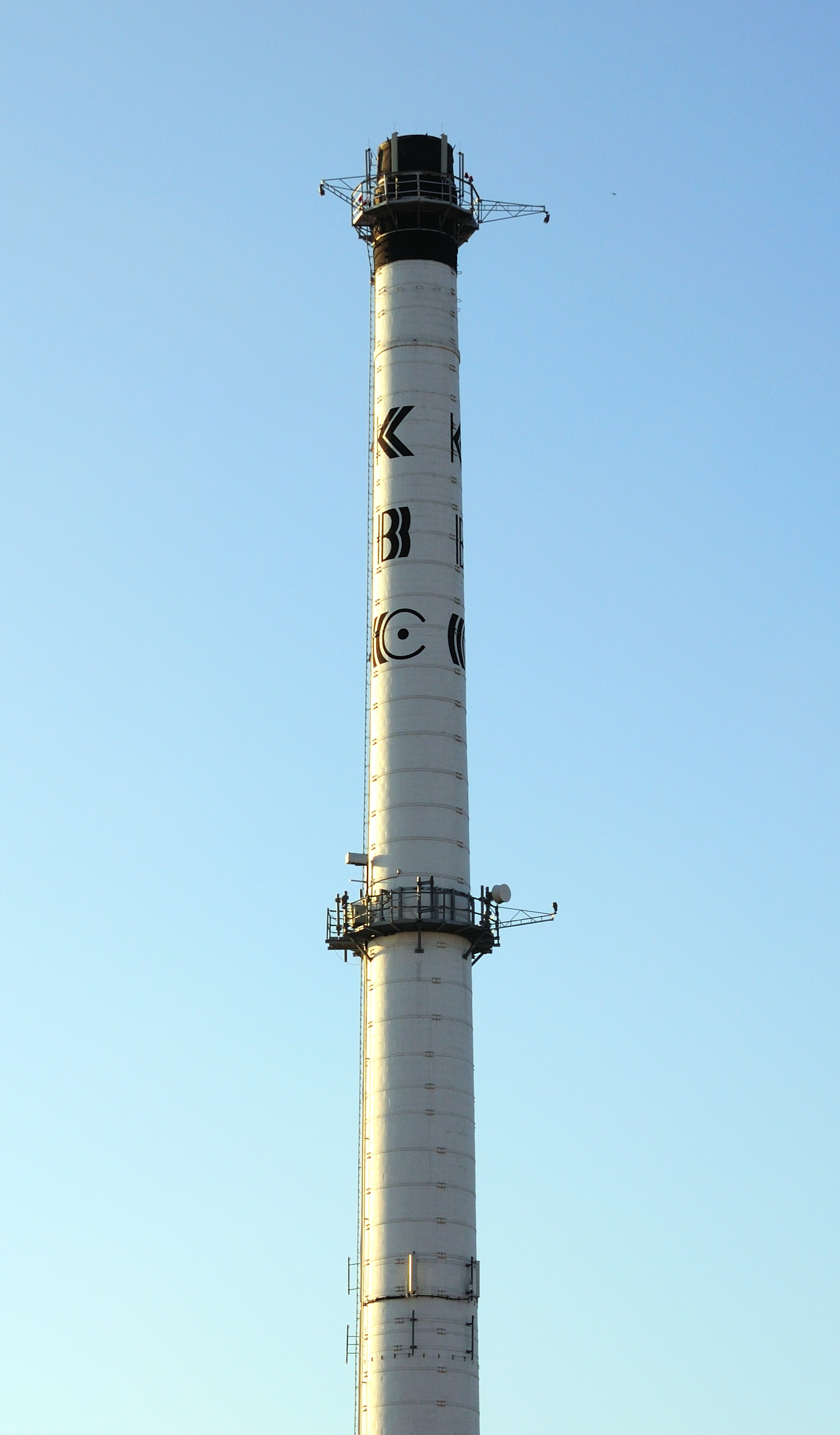 Charakteristischer Schornstein auf dem Firmengelände der KBC in Lörrach